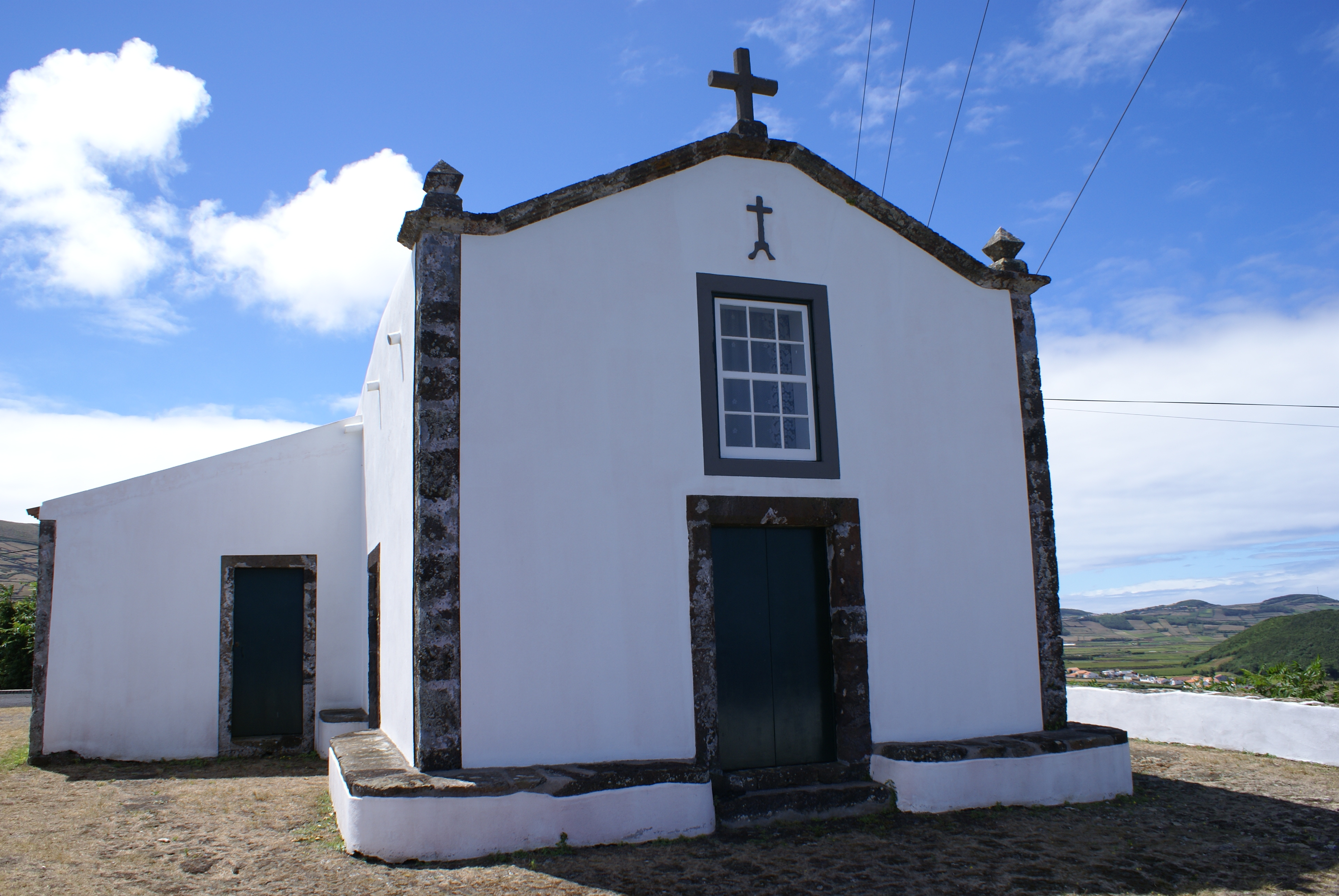 Ermida de São João, Monte da Ajuda, Santa Cruz da Graciosa, ilha Graciosa, Açores, Portugal